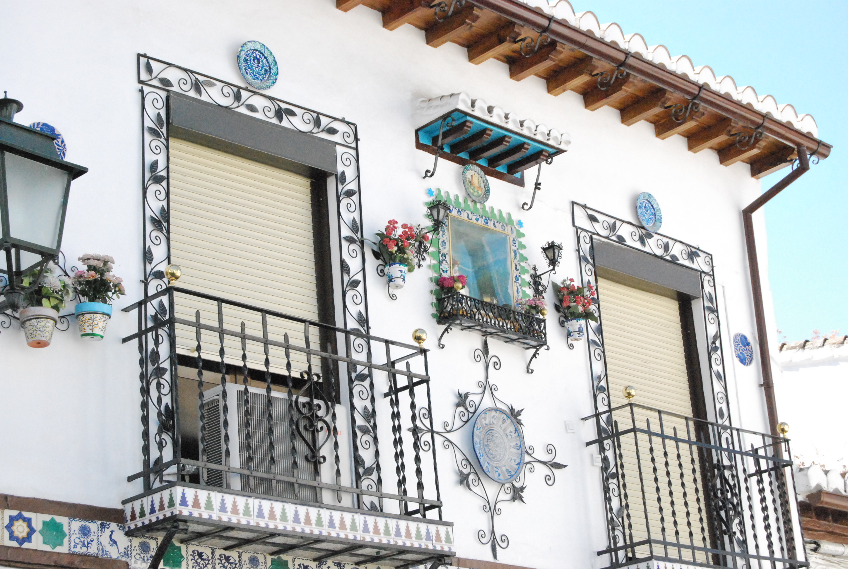 A house façade in Cuesta de Alhacaba